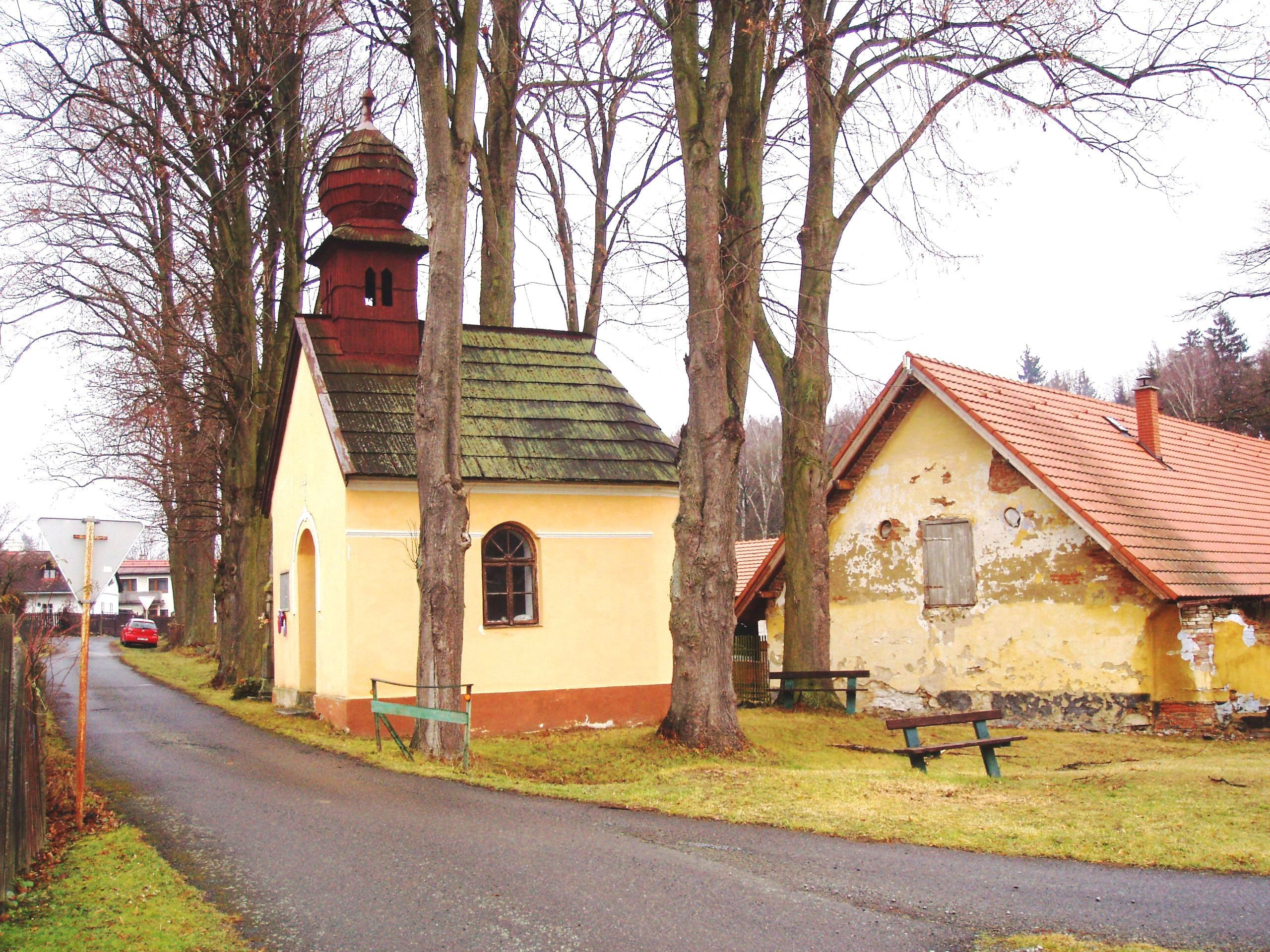 Nesvačily, Rožmitál pod Třemšínem, okres Příbram. Kaple z roku 1908